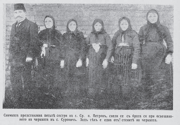 Srebren Popetrov